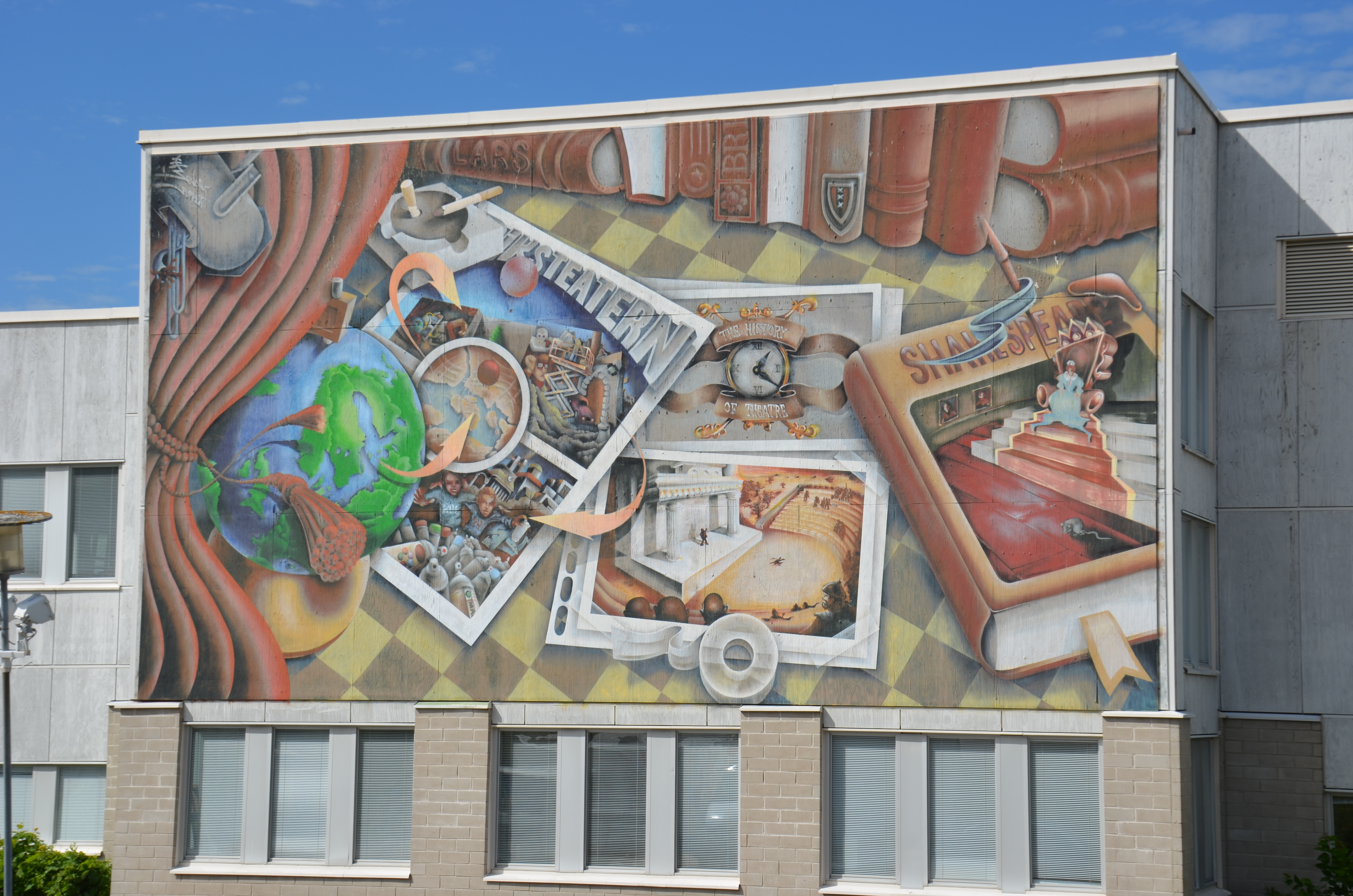 Lennart Mörks västra målning på¨fasaden till Riksteatern, Hallunda, Botkyrka